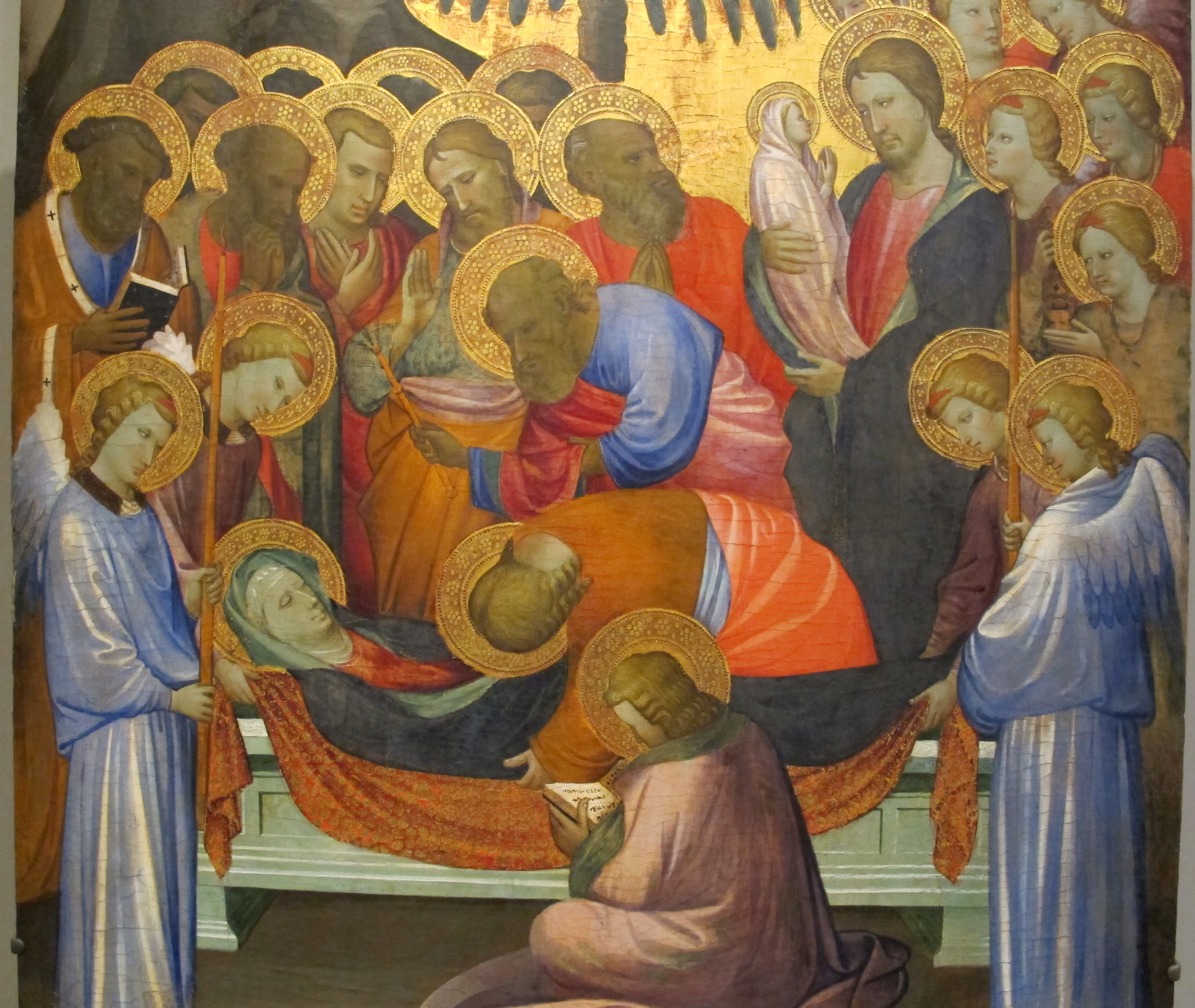 Philadelphia Museum of Art